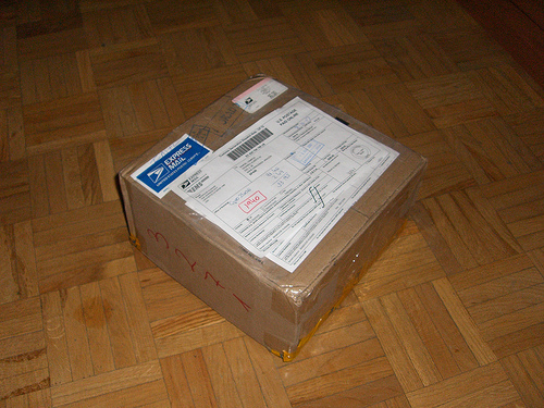 pAQUETE